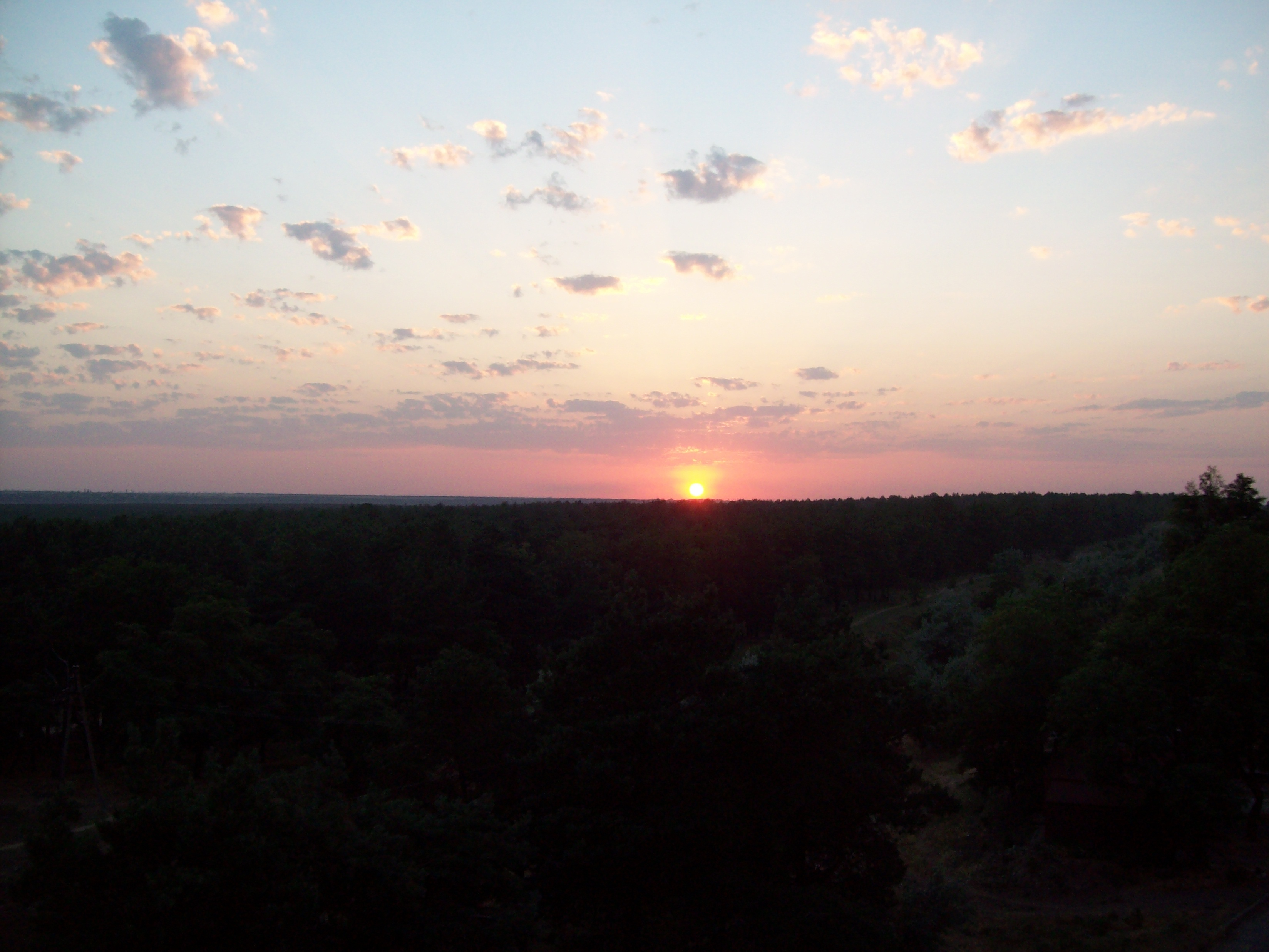 Знято фотоапаратом Kodak C-813